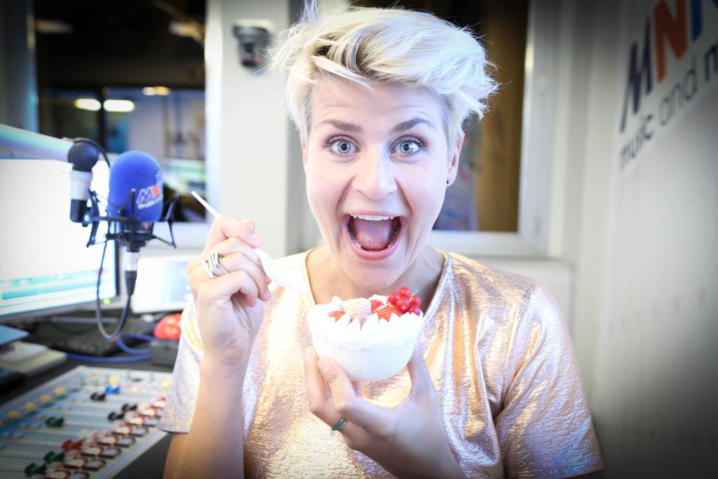 Midnight snack tijdens Marathonradio